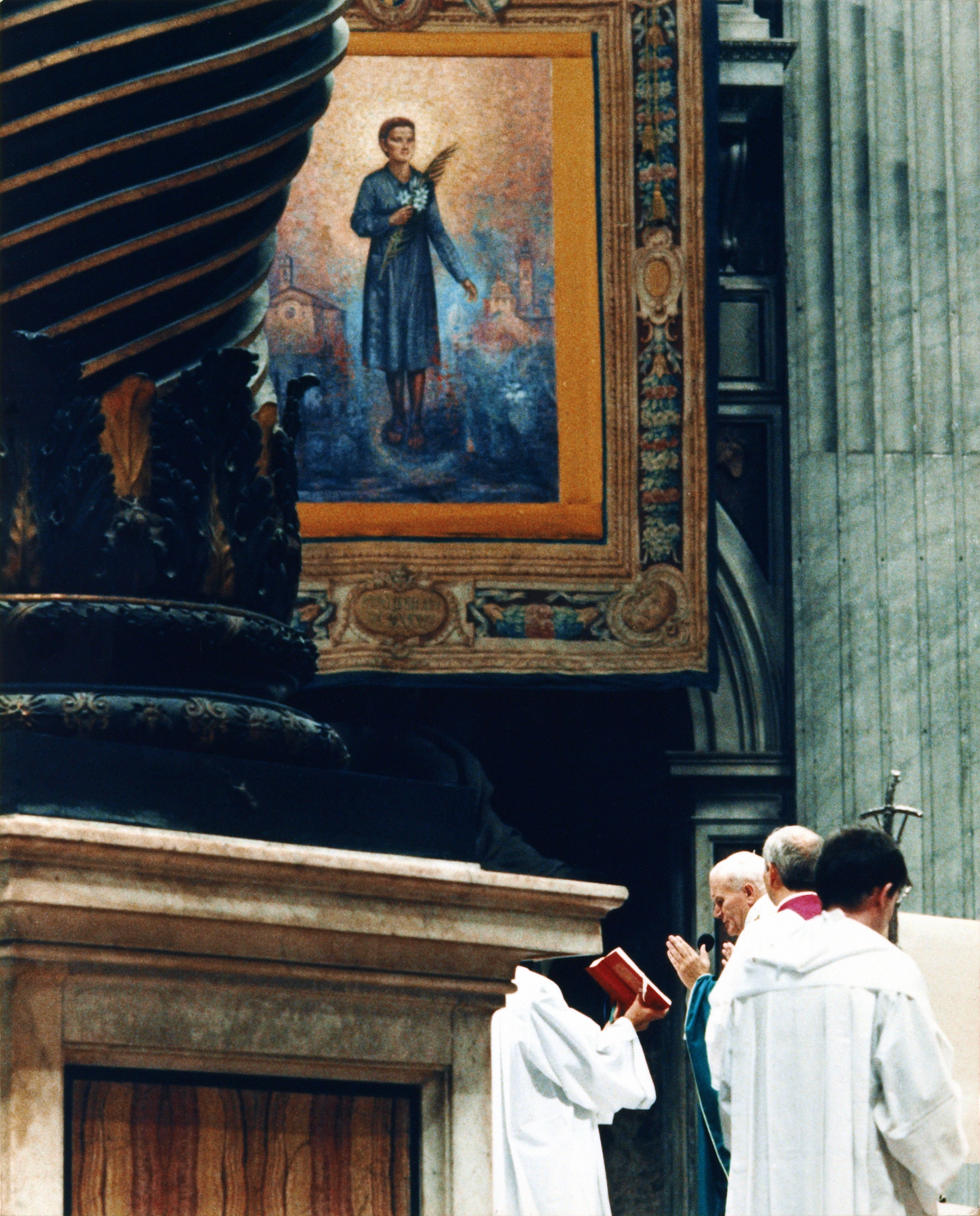 Momento della beatificazione di Pierina Morosini nella Basilica di San Pietro in Roma presieduta da Giovanni Paolo II il 4 ottobre 1987.